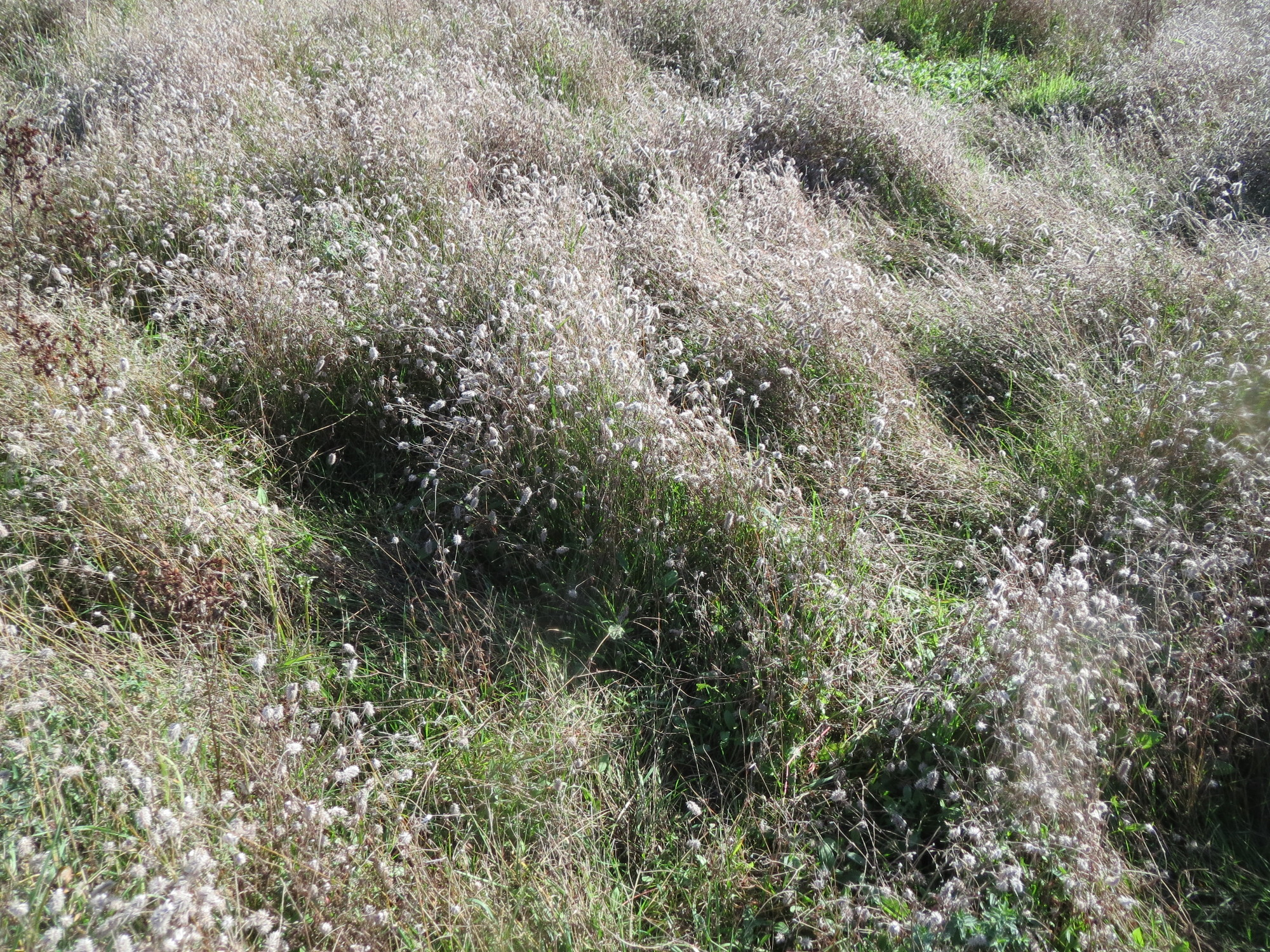 Ein schier endloses Meer von Hasen-Klee (Trifolium arvense) im Naturschutzgebiet Gewann Frankreich-Wiesental